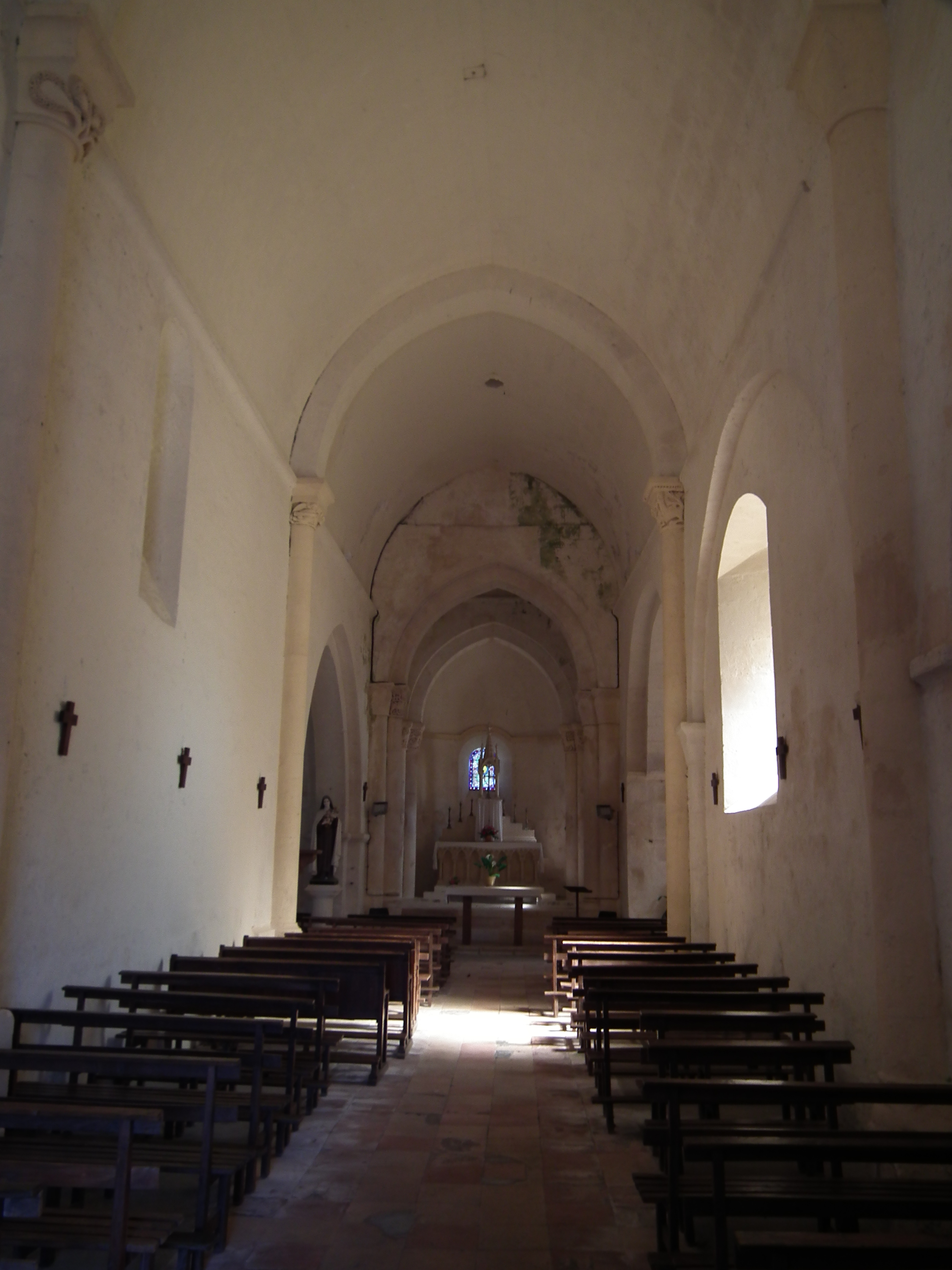 Intérieur de l'église de Guitinières